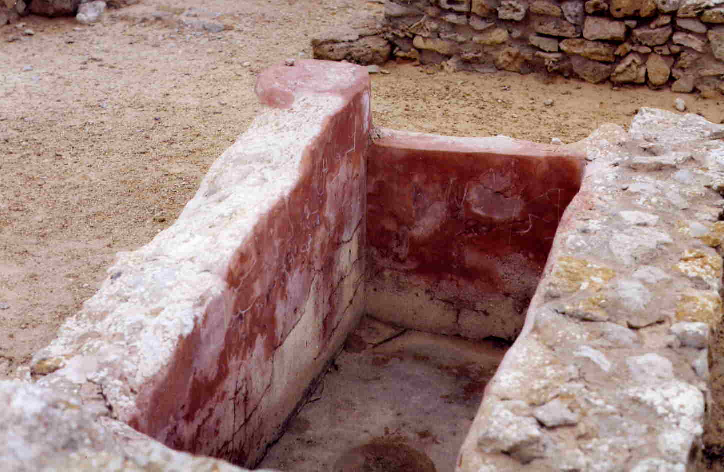 bath at Kerkouane photo taken by Udimu (summer 2001)